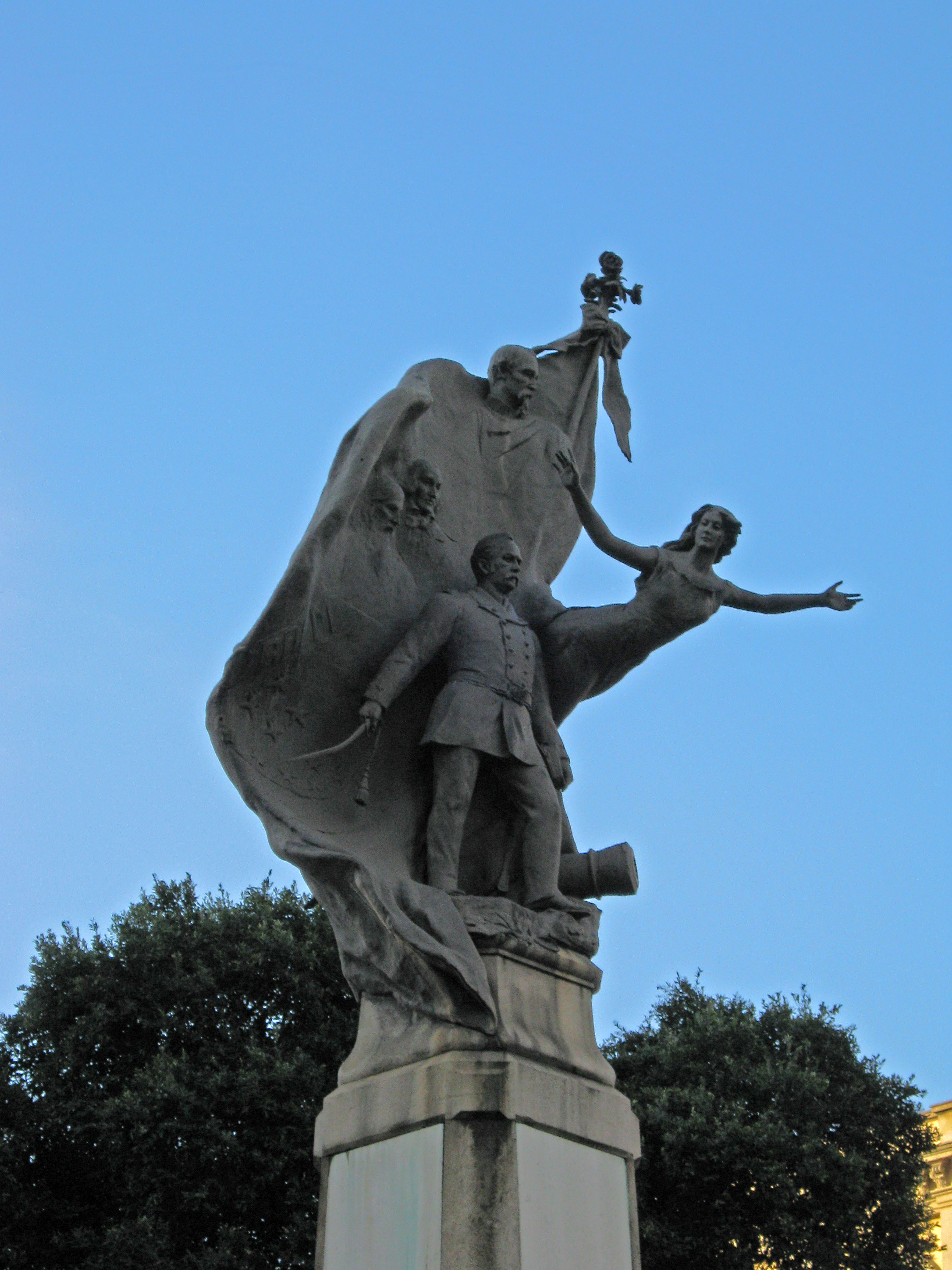 Monumento ao Marechal Floriano Peixoto na Praça Floriano, Cinelândia, Rio de Janeiro.